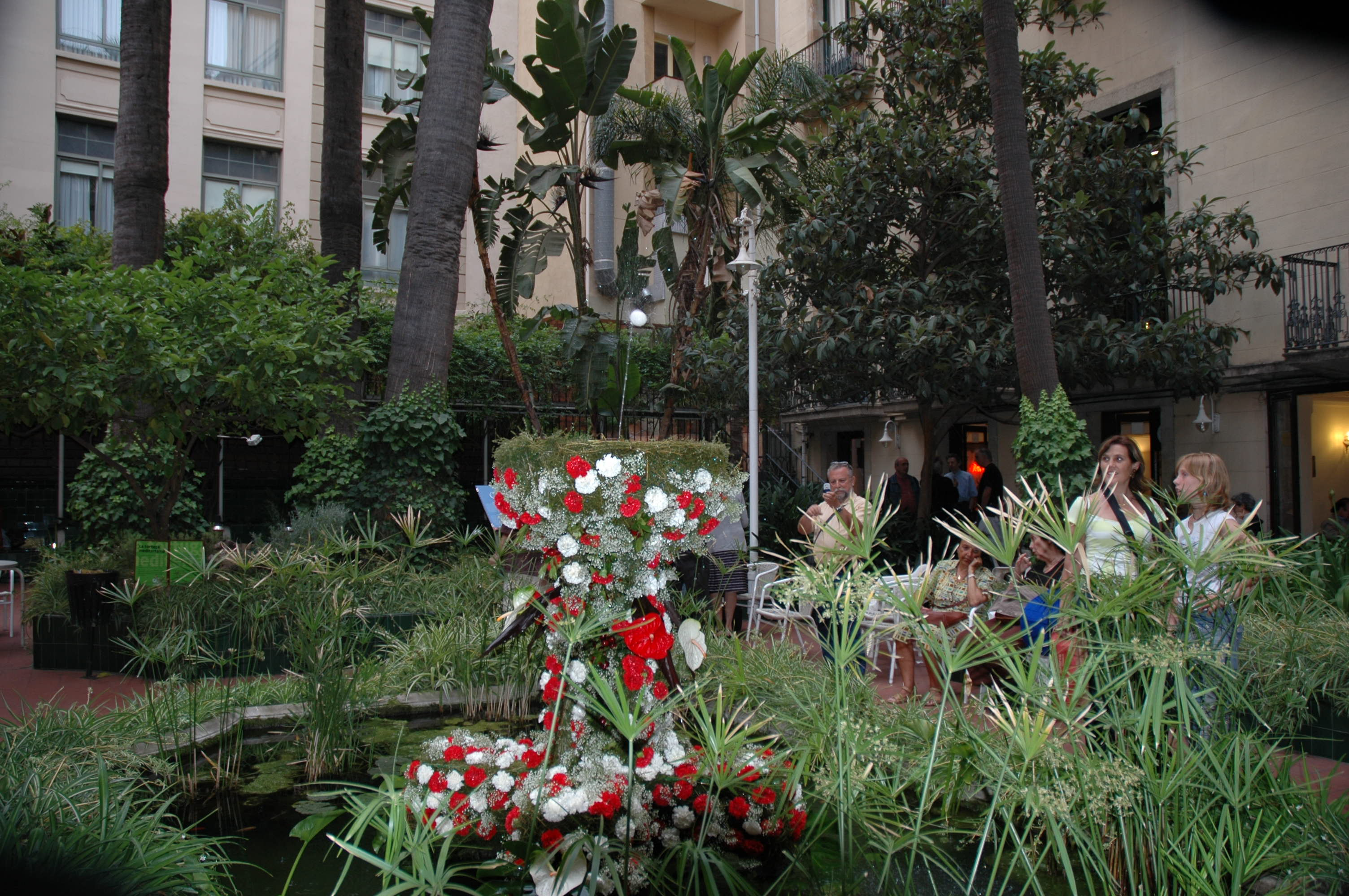 Ateneu Barcelonès. L'"ou com balla", una de les tradicions barcelonines del dia del Corpus Christi. Any 2006.